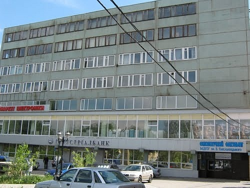 Корпус філологічного факультету Мелітопольського державного педагогічного університету ім. Б. Хмельницького